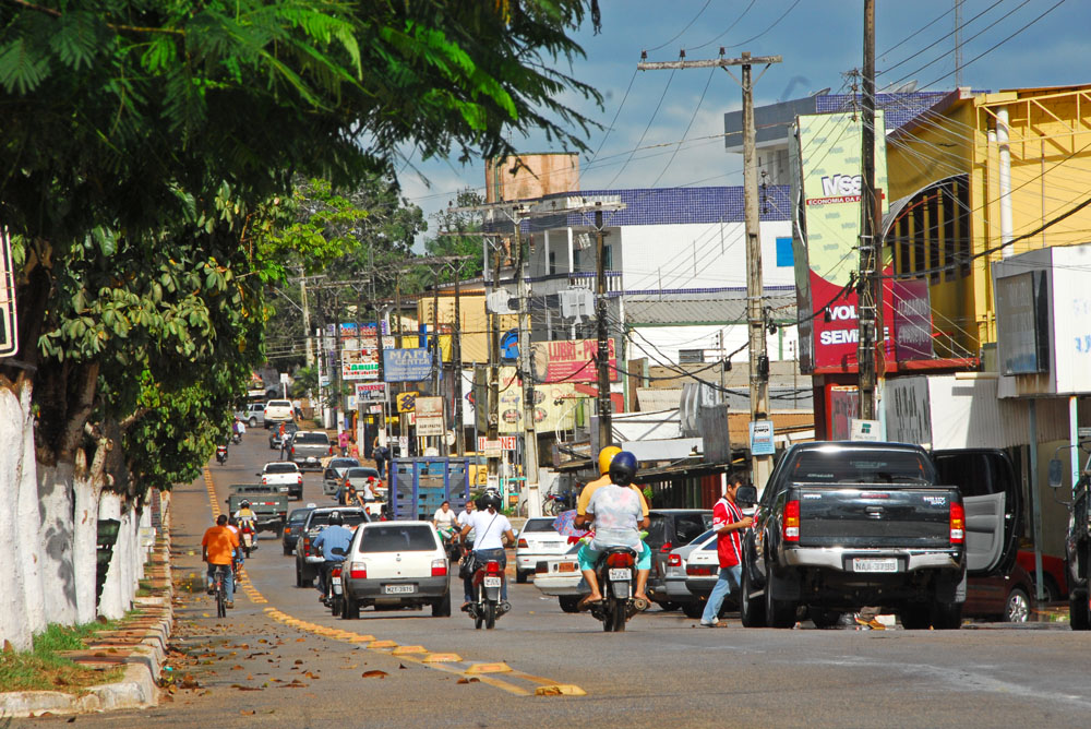 Av Santos Dumont Epitaciolândia - Acre